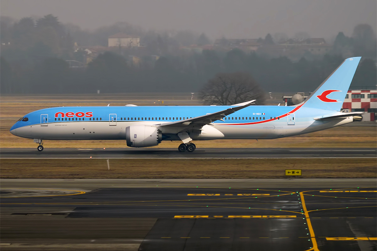 Neos, EI-NEO, Boeing 787-9 Dreamliner